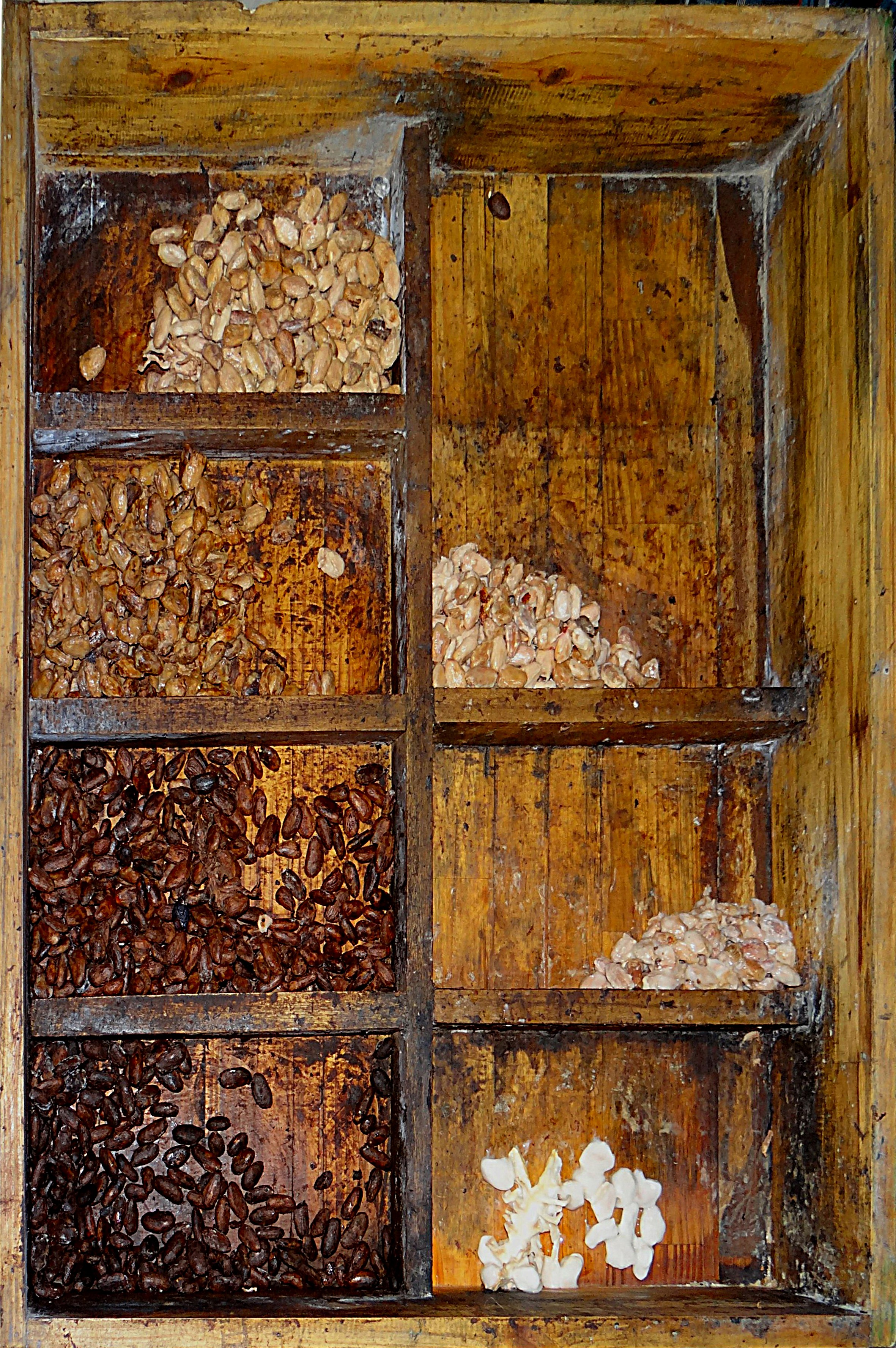 Fèves de cacao à différents stades de fermentation, "Tirimbina" (Réserve biologique), Costa Rica.